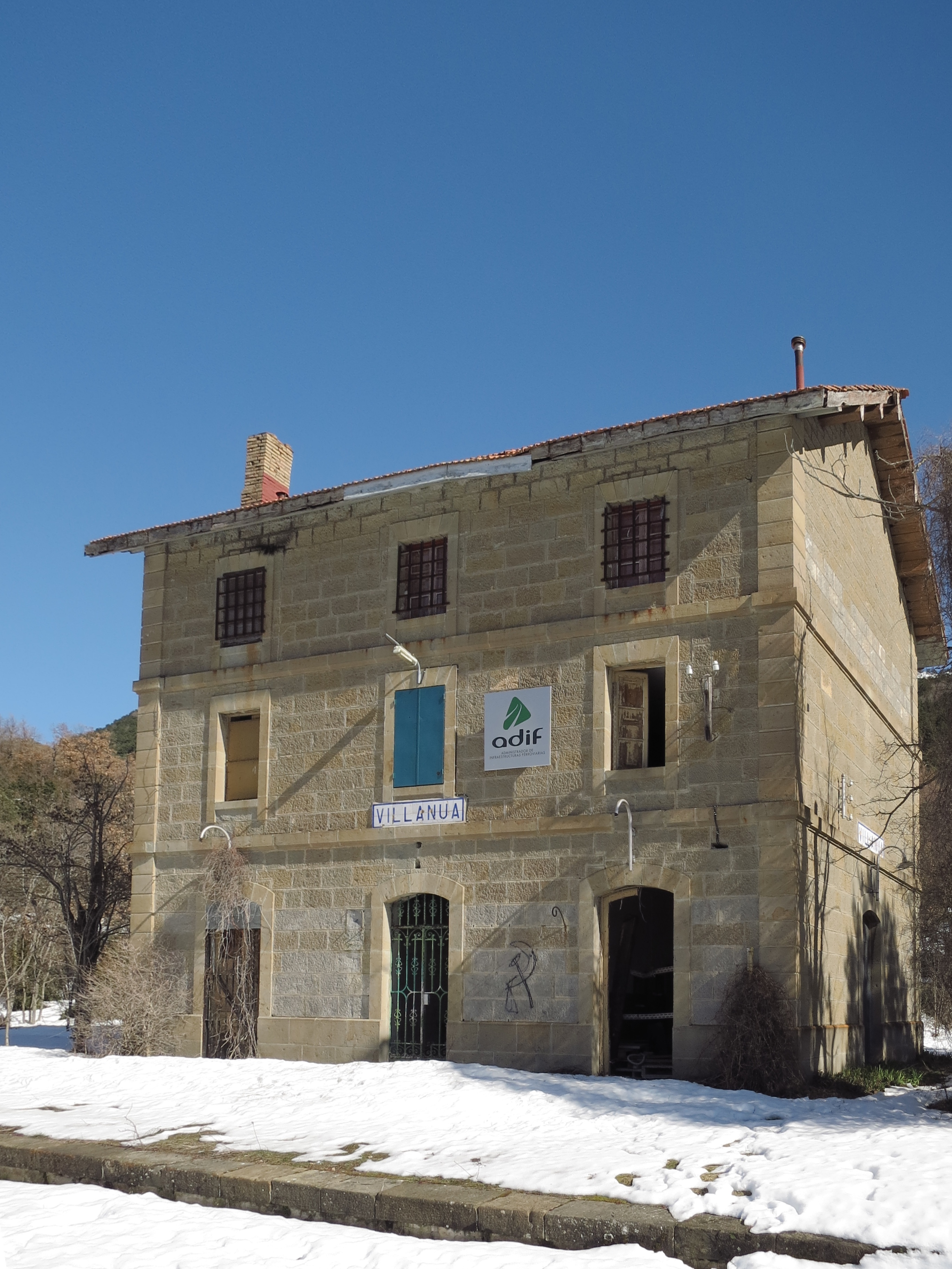 Villanúa (Jacetania, Aragón, España) - Antiguo edificio de la estación de Villanúa-Letranz.